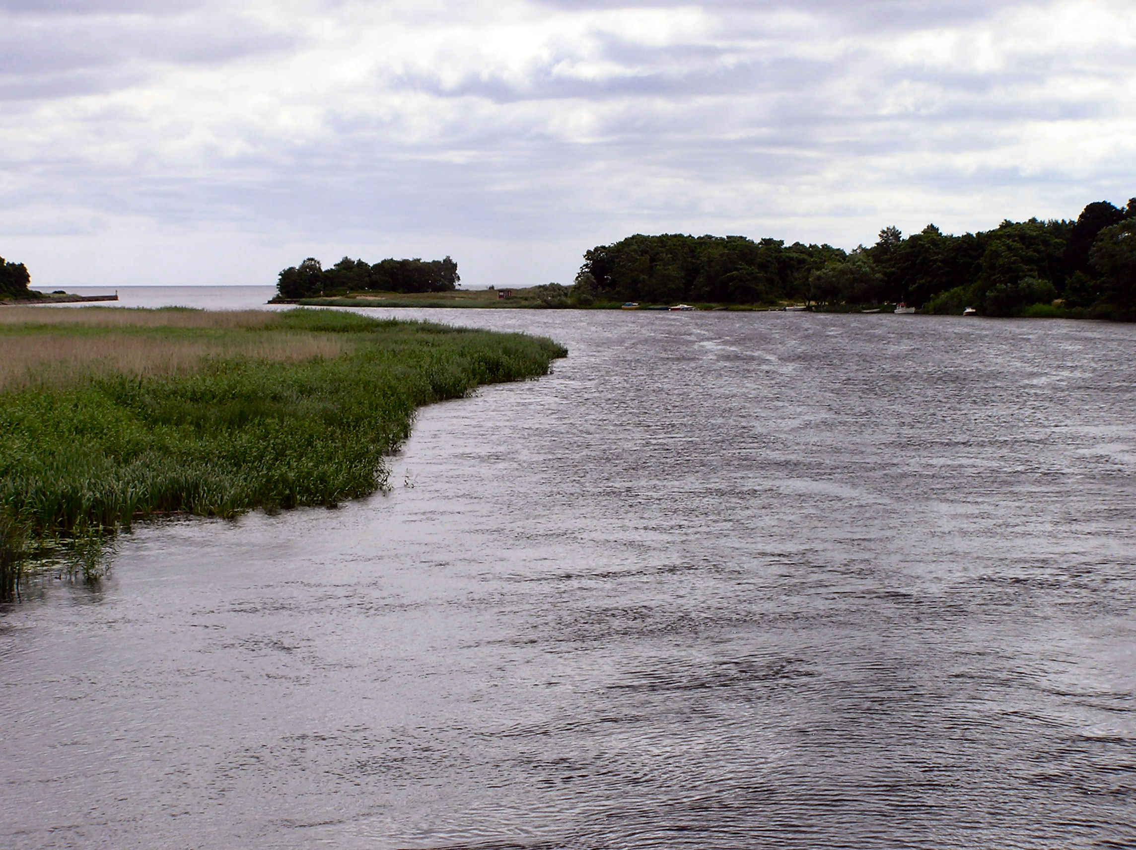 Helgeå nær udmundingen i Hanöbugten